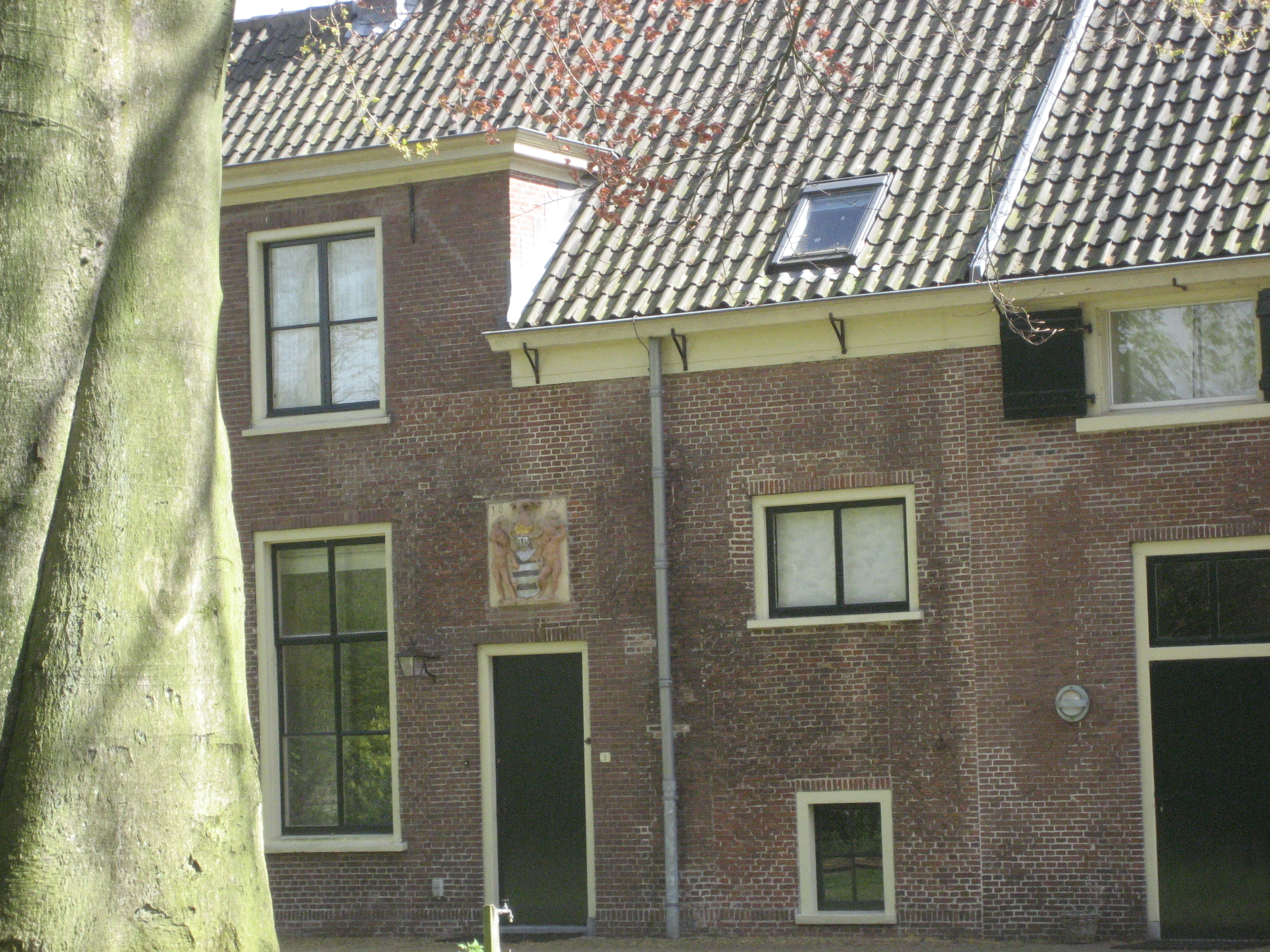 Landgoed De Horsten, Wassenaar/Voorschoten. Huis Raephorst, met wapenschild